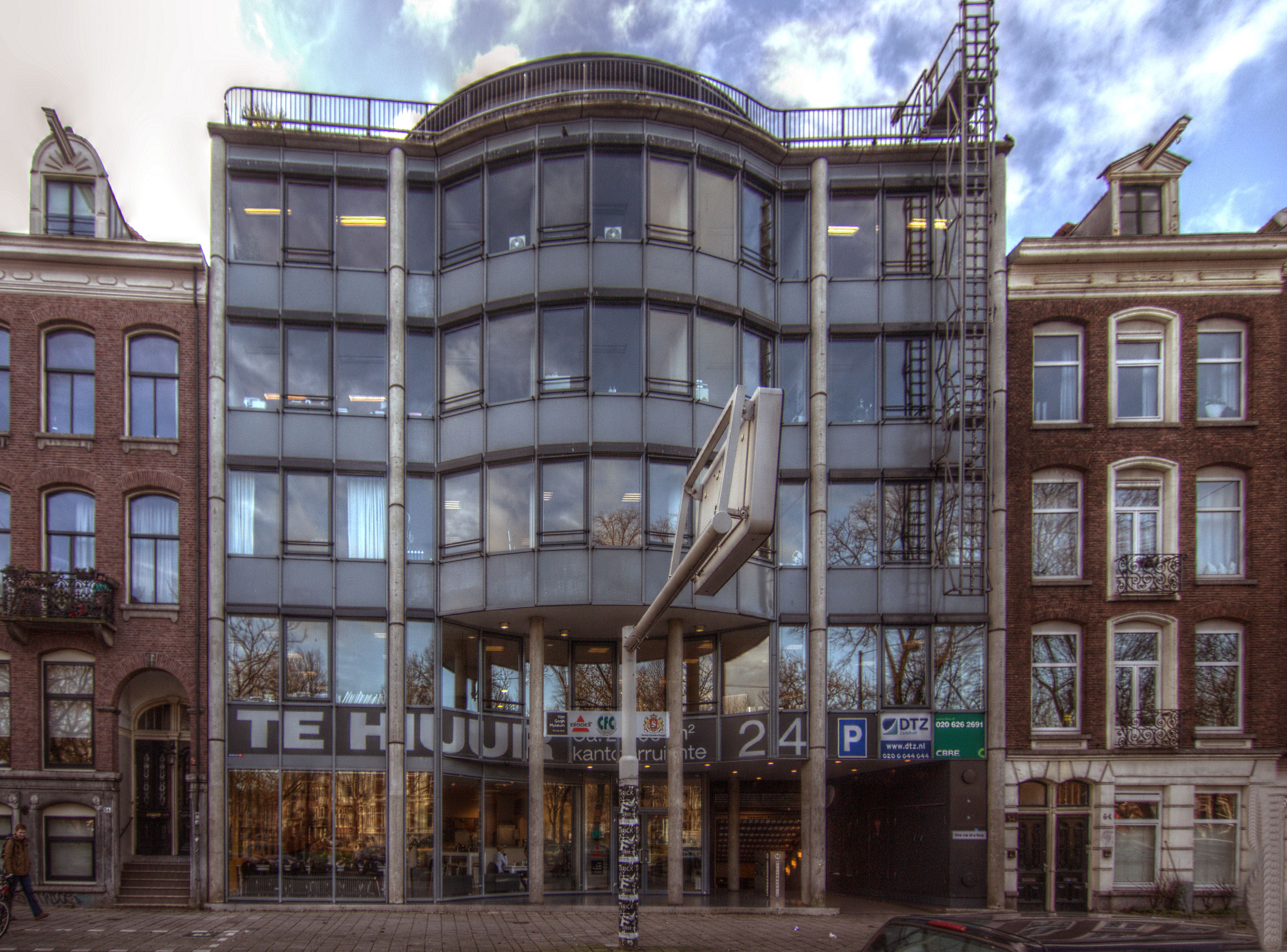 Stadhouderskade 55 in Amsterdam, bekend onder naam Willemshuis, architect Theo Bosch